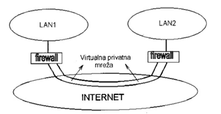 Primer zaštitnog zida poznatijeg kao virtualna privatna mreža.